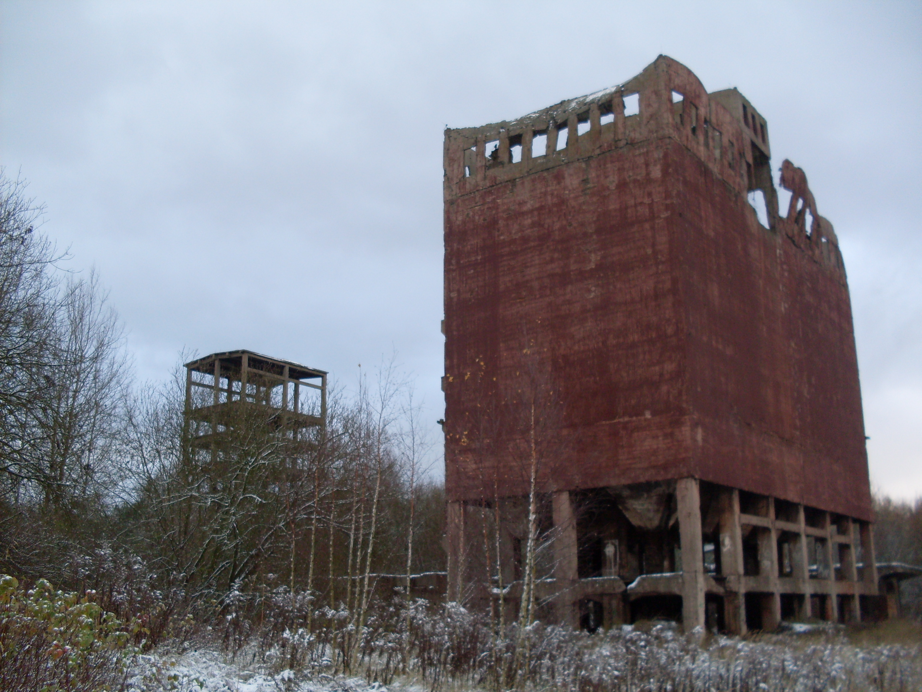 Elewator węglowy w fabryce benzyny syntetycznej w Policach